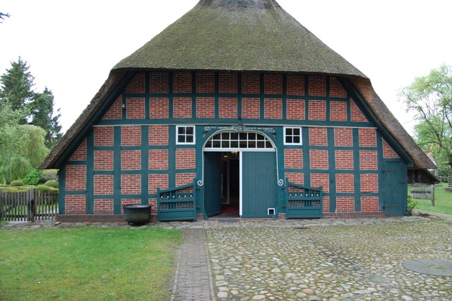 Altes Bauernhaus von 1801, ehemaliges Hauptgebäude der Grundschule FREIraum Oldenburg